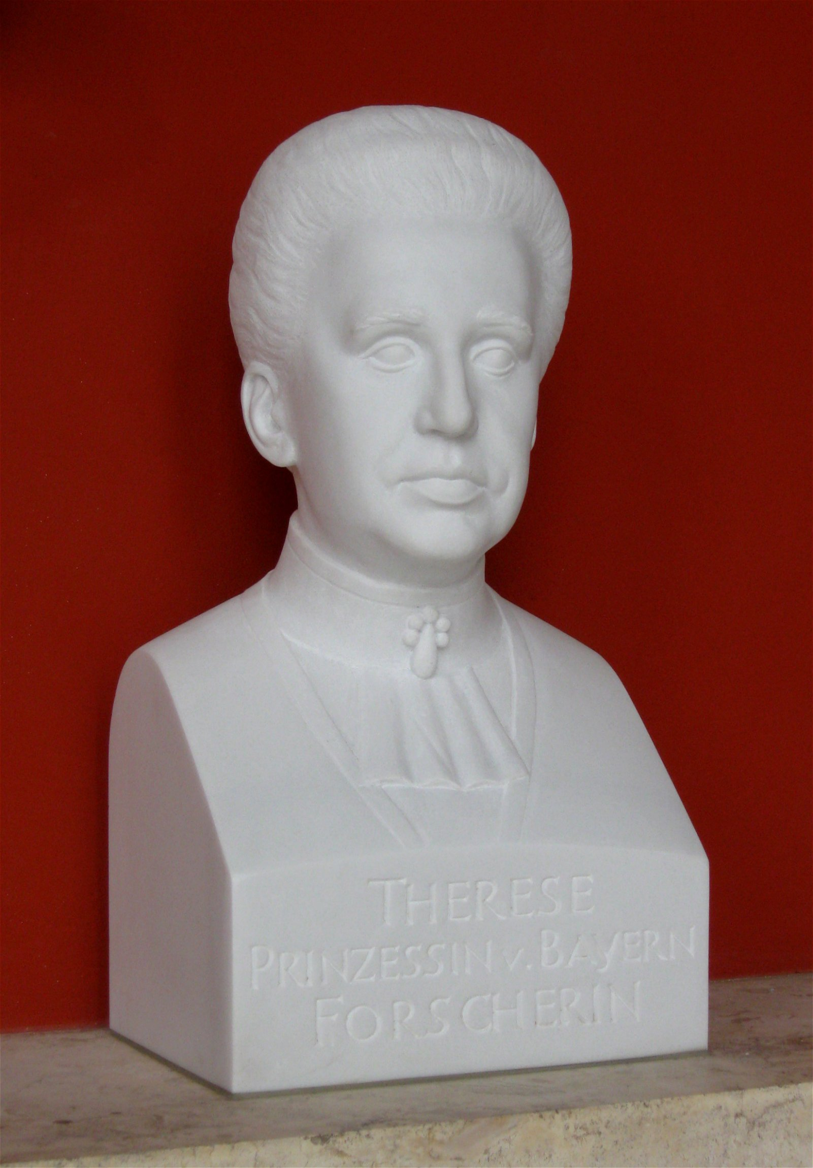 Ruhmeshalle München: Therese Prinzessin v. Bayern Forscherin (im Jahre 2009 neu aufgestellt)